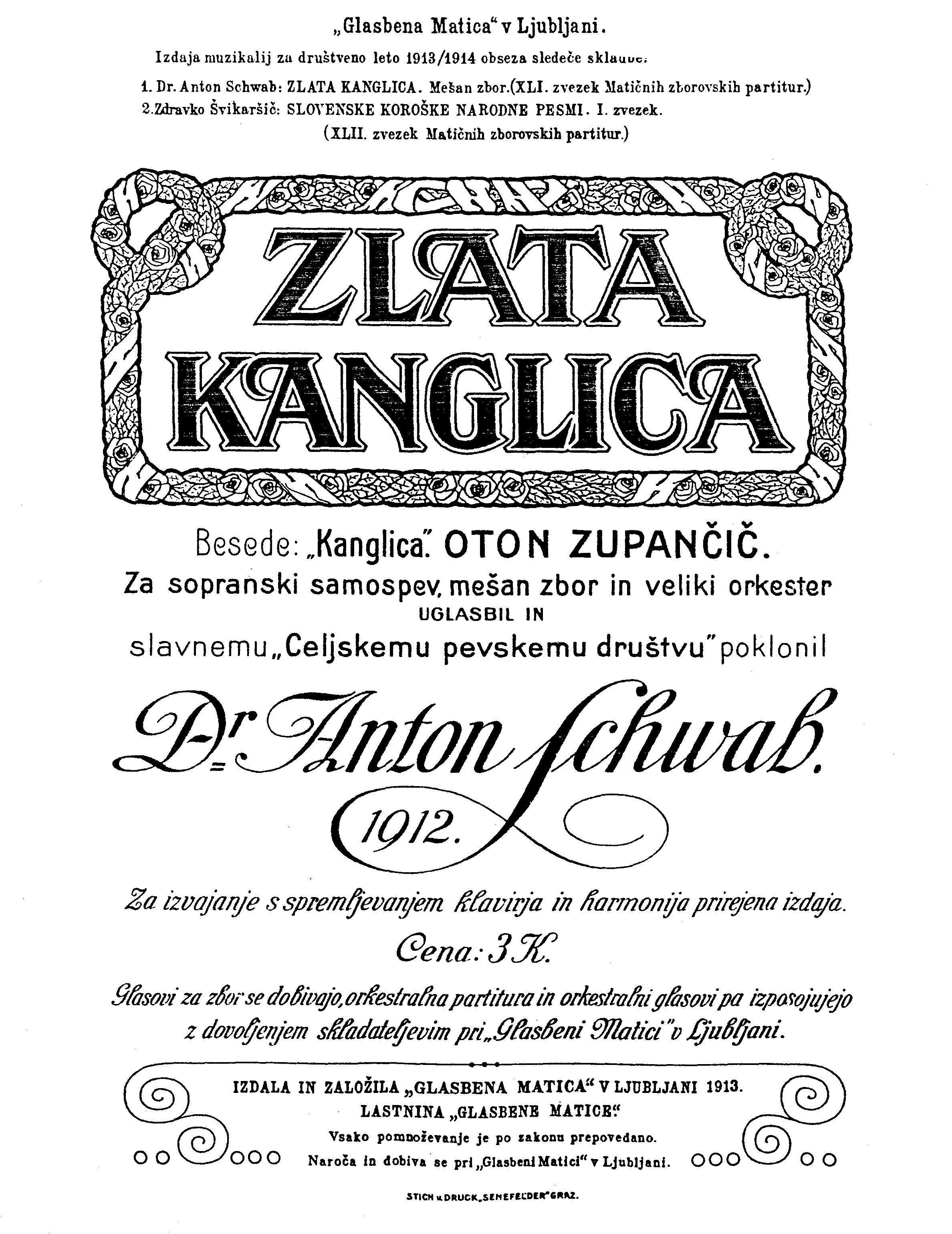 Naslovnica notnega zvezka "Zlata ladjica", avtor Anton Schwab (1868-1938)